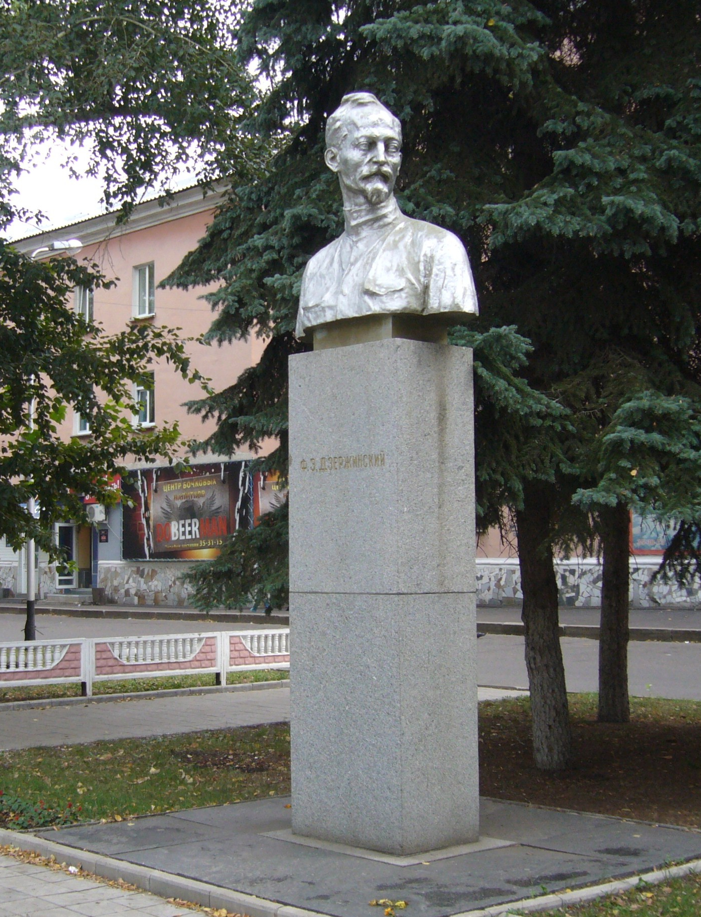 Dieses Denkmal befindet sich in Salavat in der Dscherschinski-Straße